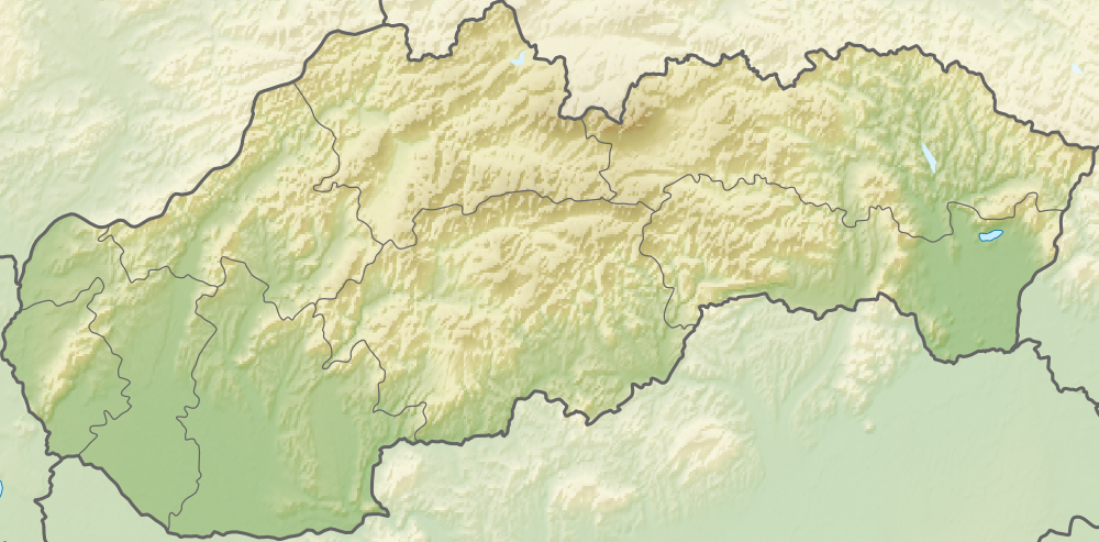 Relief map of Slovakia.